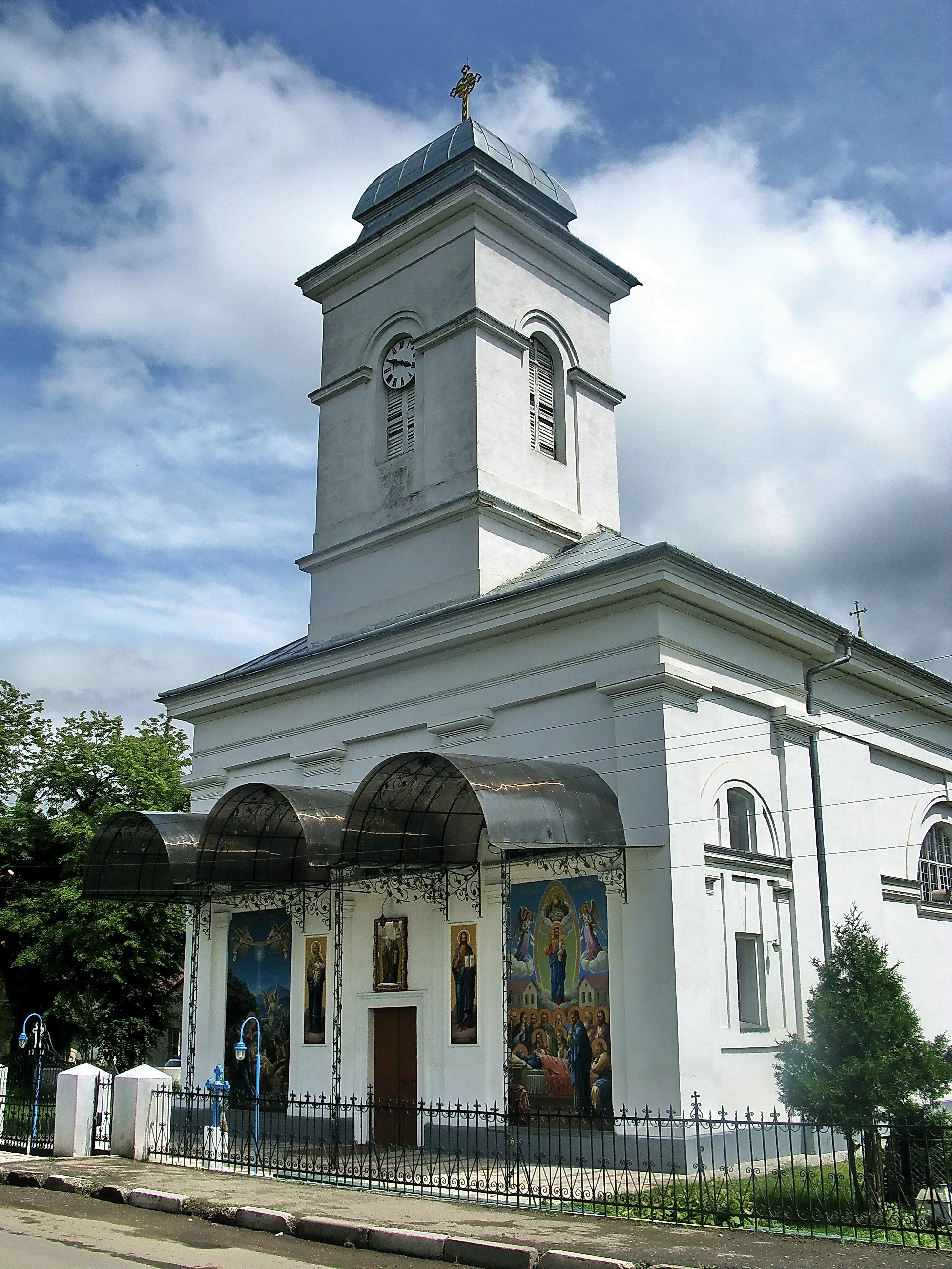 Миколаївська церква (мур.), м. Вашківці